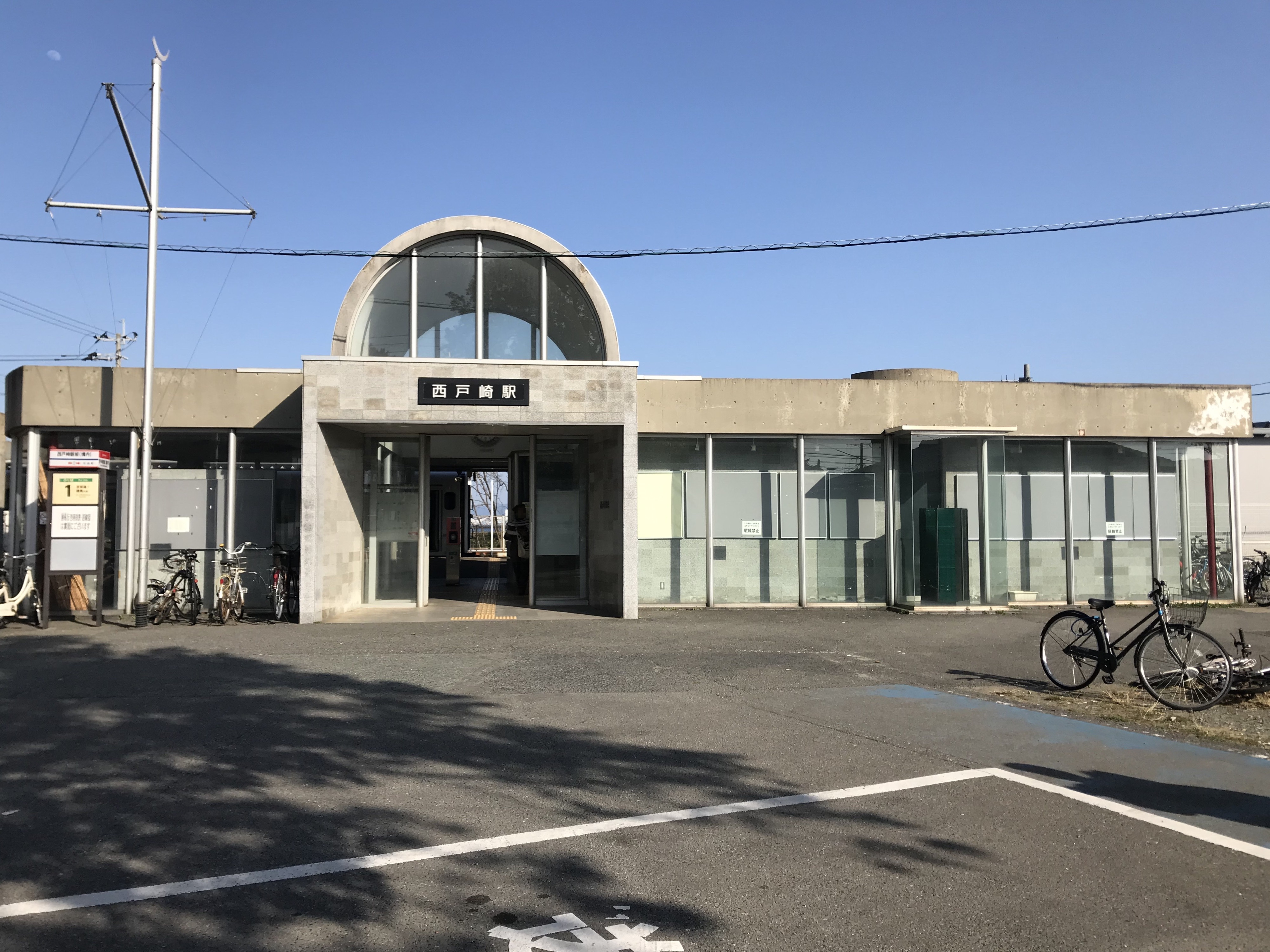 西戸崎駅の駅舎